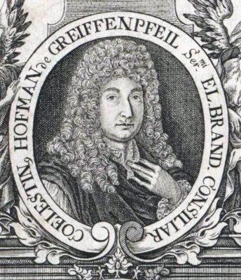 Bildnis Coelestin Hofman von Greiffenpfeil (1635–1688)